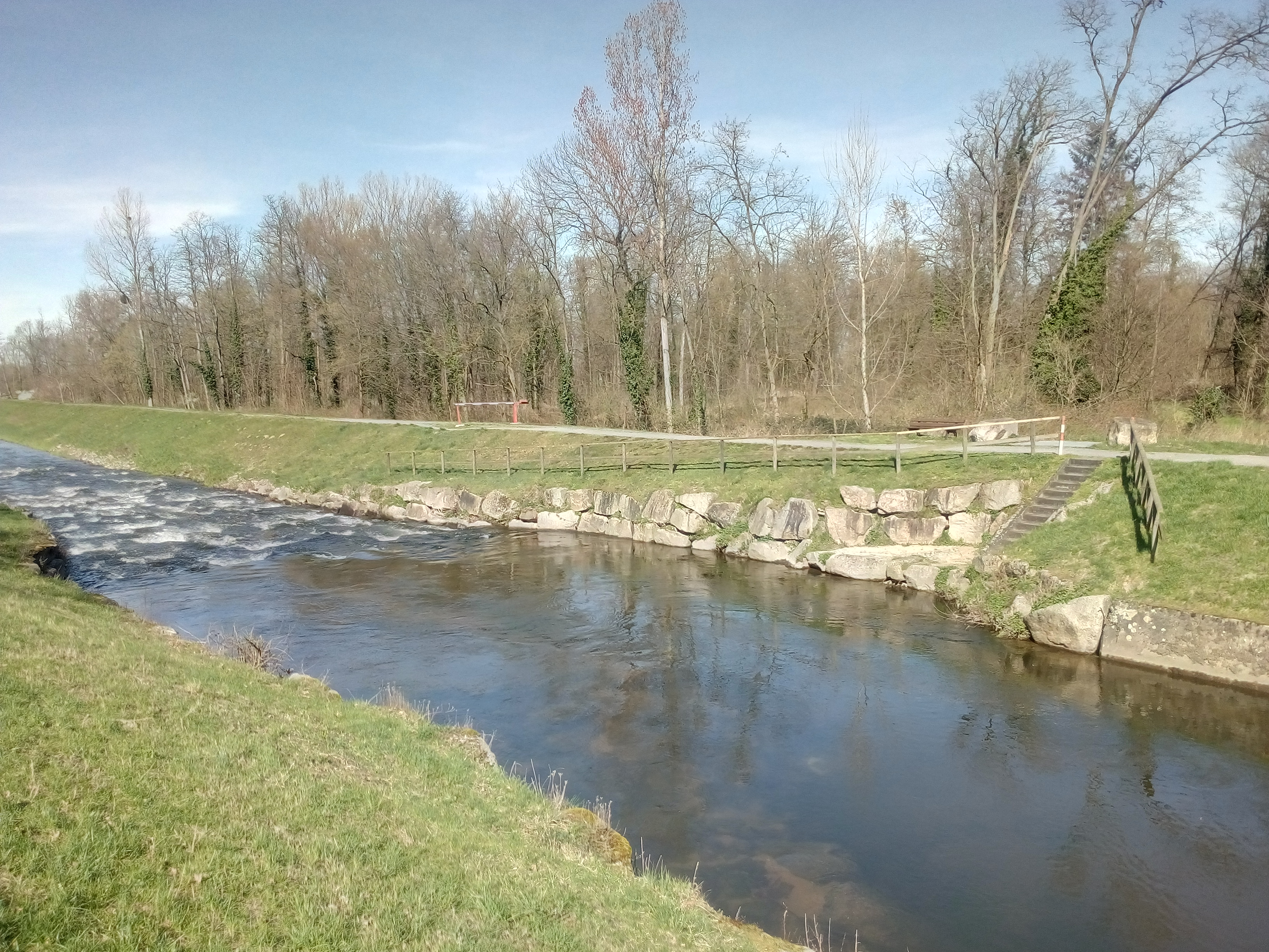 Abzweig des Iffezheimer Mühlbachs (Oberlauf des Riedkanals) vom Sandbach, Raue Rampe im Sandbach